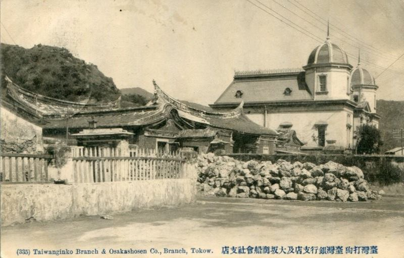 臺灣銀行打狗支店和大阪商船打狗支店。